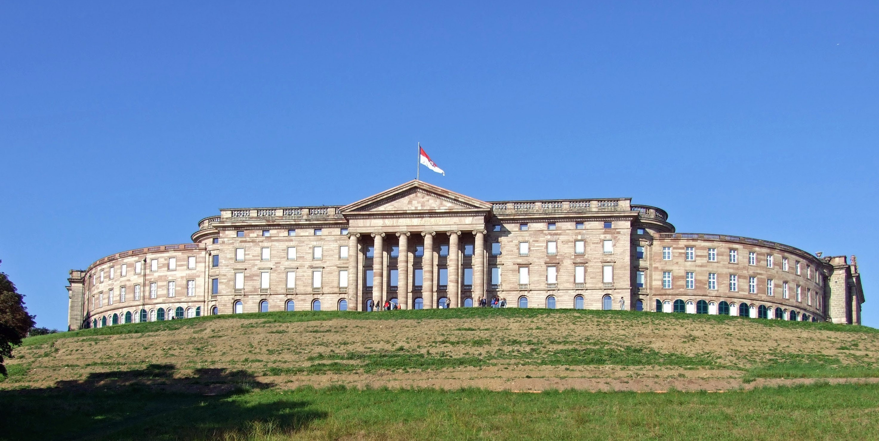 Schloss Wilhelmshoehe in Kassel, waehrend der Documenta 2007